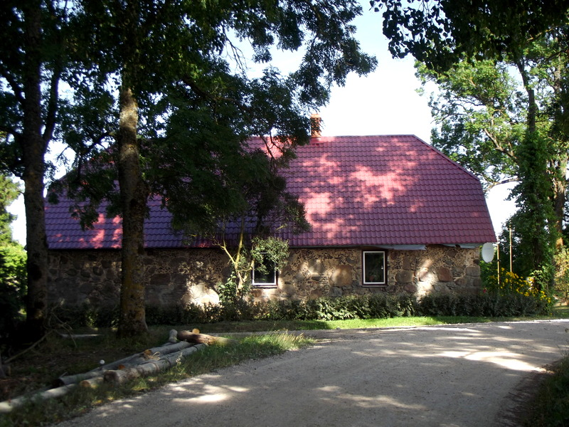 Daigones muiža